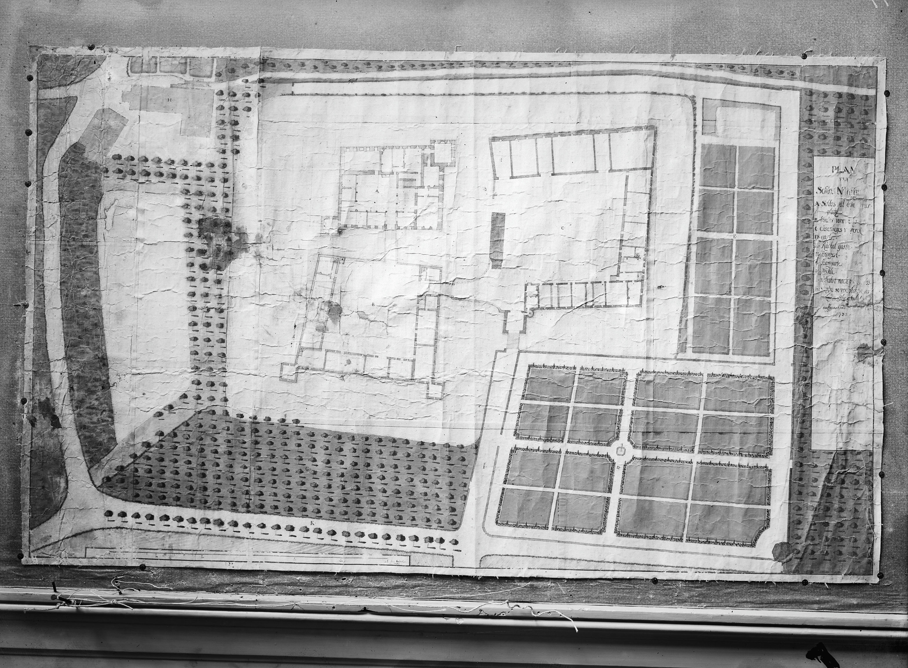 Kasteel Neubourg: grondplan van 1732 naar een tekening in het bezit van Graaf de Marchant et d'Ansembourg